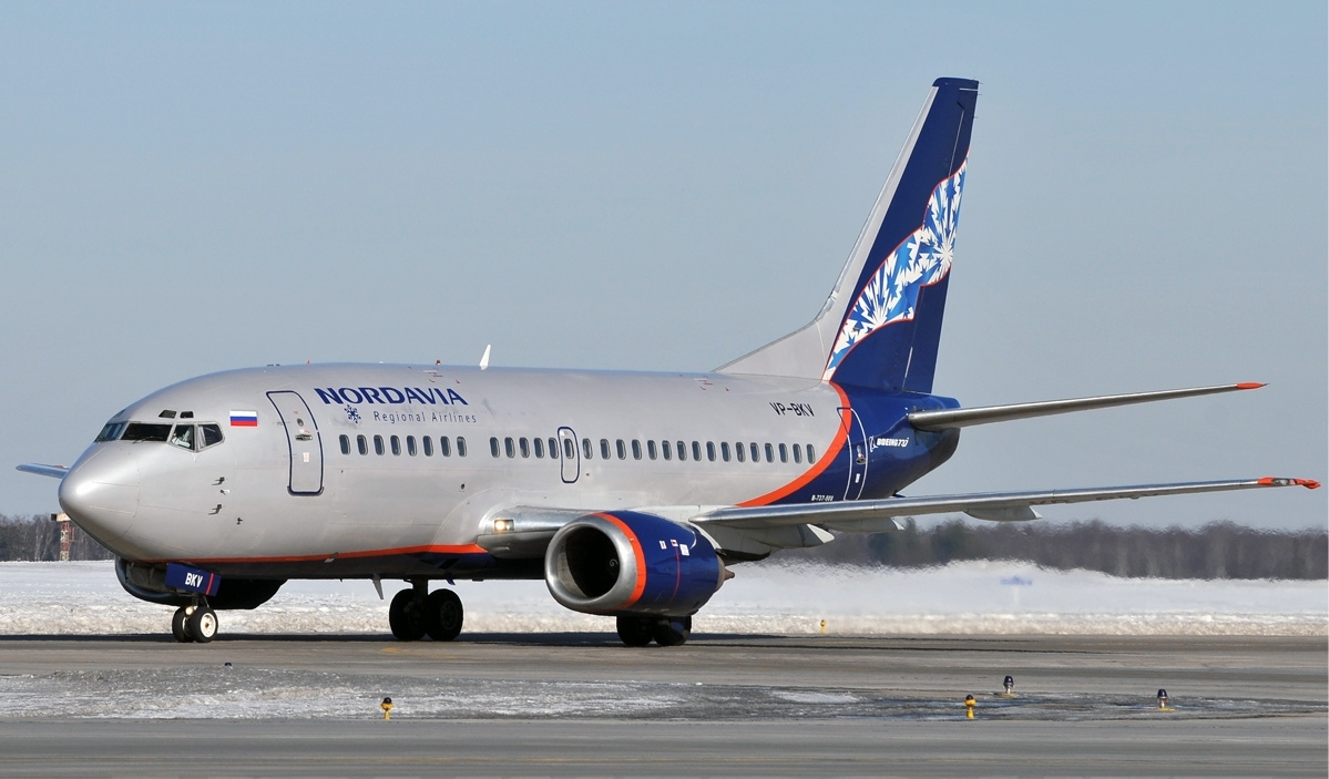 VP-BKV, Nordavia Boeing 737-500, Sheremetyevo